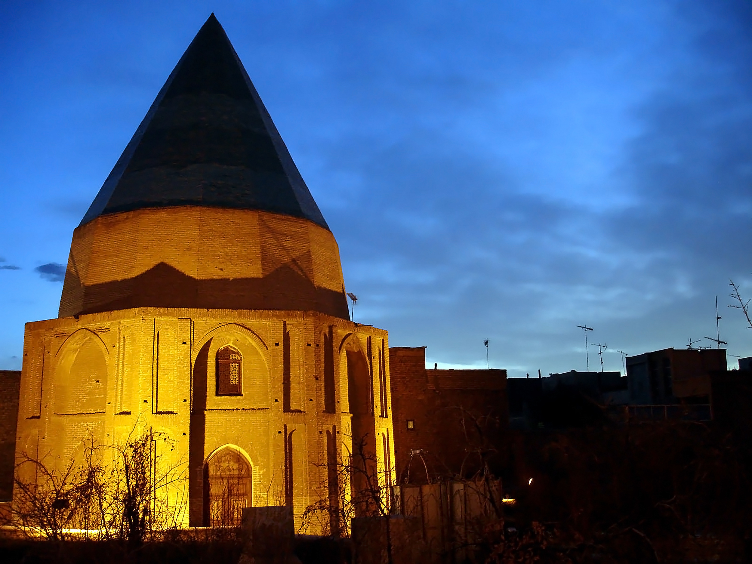 عکاسی در شب، به عکاسی در فضای آزاد در ساعات شب گفته می‌شود. عکاسی در شب، معمولاً با دیافراگمهای بسته و زمان‌های نوردهی طولانی انجام می‌شود. در این عکاسی نقاط نورانی متحرک به صورت خطی نورانی و کشیده در صفحه حساس عکاسی ضبط می‌شود.